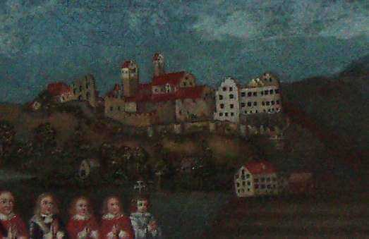 Schloss Hirschberg bei Beilngries nach dem Brand von 1632, Gemälde-Ausschnitt